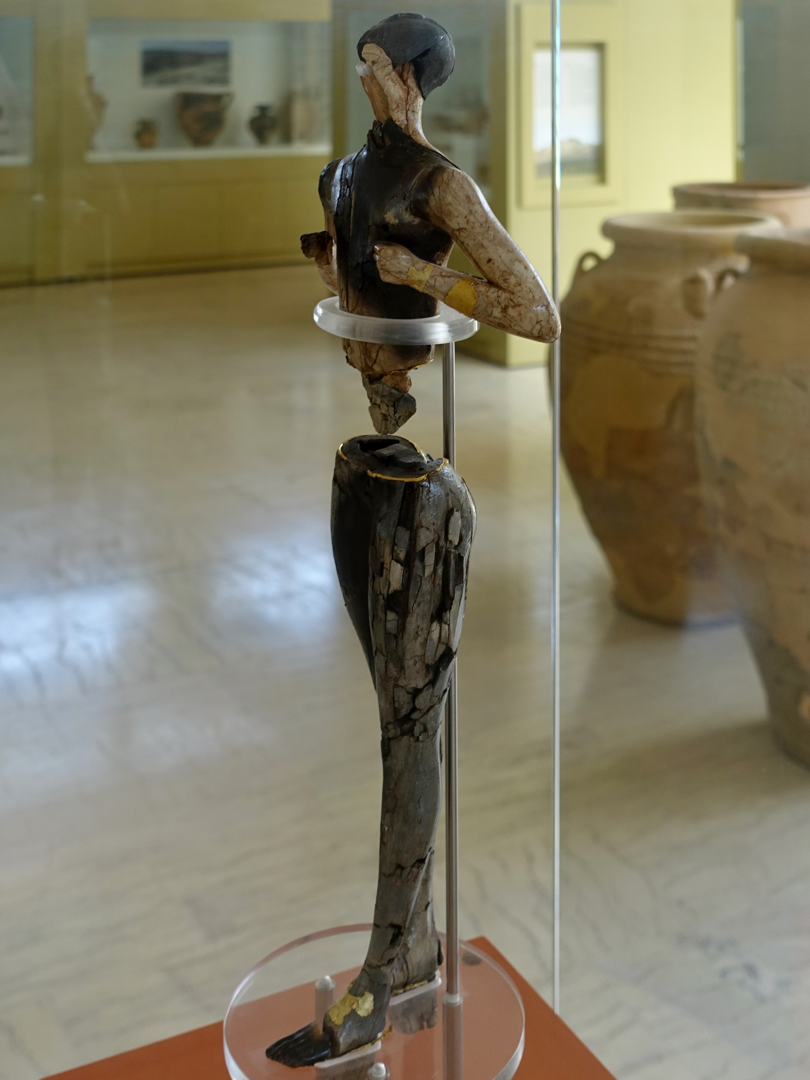 Kouros von Palaikastro (1480–1425 v. Chr.), minoische Götterstatue aus Haus 5 der Ausgrabungsstätte von Roussolakkos, Archäologisches Museum von Sitia, Kreta, Griechenland